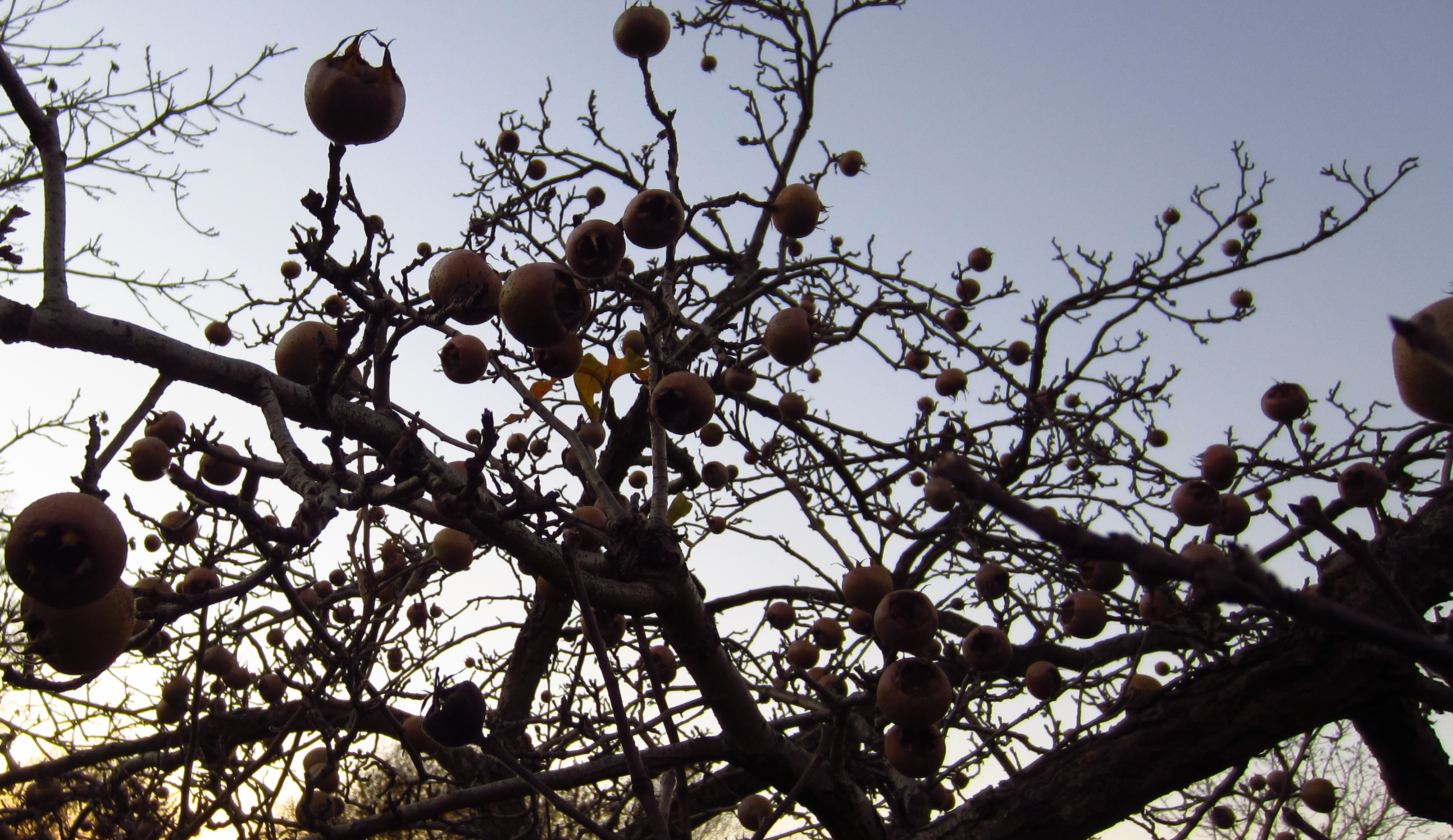 Mispelstruik in de late herfst